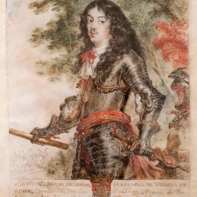 Inigo melchor, gobernador de los paises bajos.